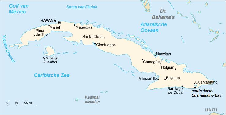 cia-kaart kaart van cuba